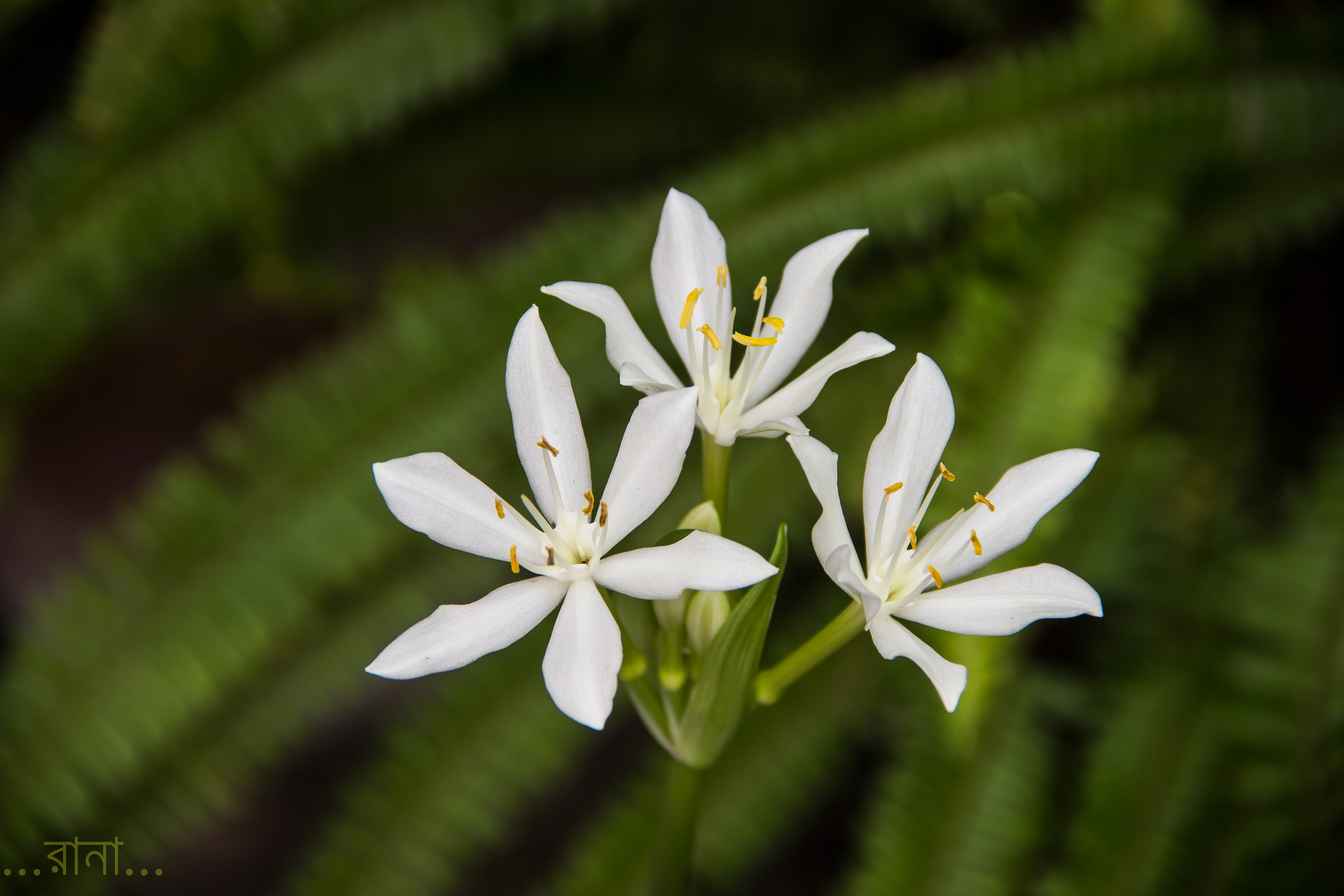 Cardwell lily/ কার্ডওয়েল লিলি